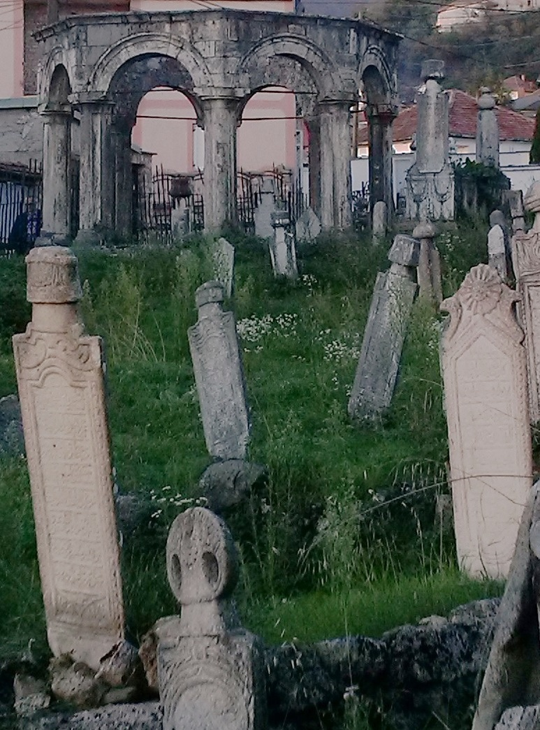 „Инкјар џамија“, Дебар